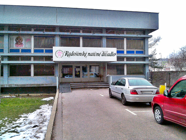 Vstup do budovy RND.